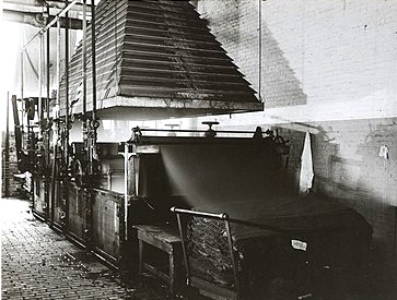 Vícebubnový krabovací stroj (pravděpodobně) z roku 1919